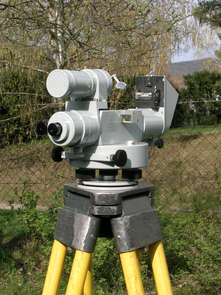 Zeiß-Nivelliergerät Ni2 als Astrolab ausgerüstet:vor dem Fernrohr (30x, Ø 4cm) ein 30/60° Prisma, über dem Okular die Beleuchtung. Azimut-Feintrieb, 3 Fußschrauben und Dosenlibelle in der Bildmitte.